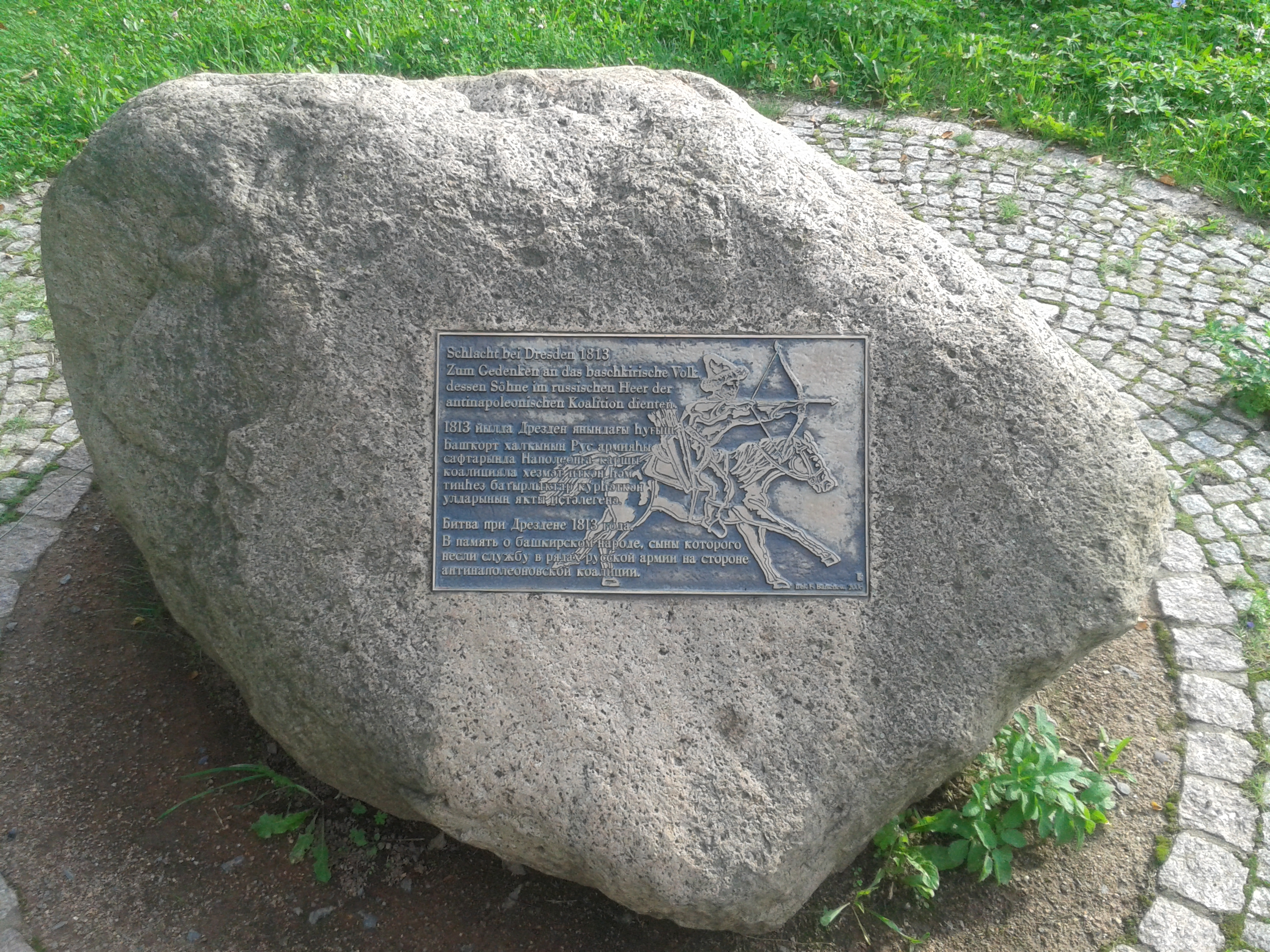 Gedenkstein für die Schlacht bei Dresden 1813, zum Gedenken an das baschkirische Volk